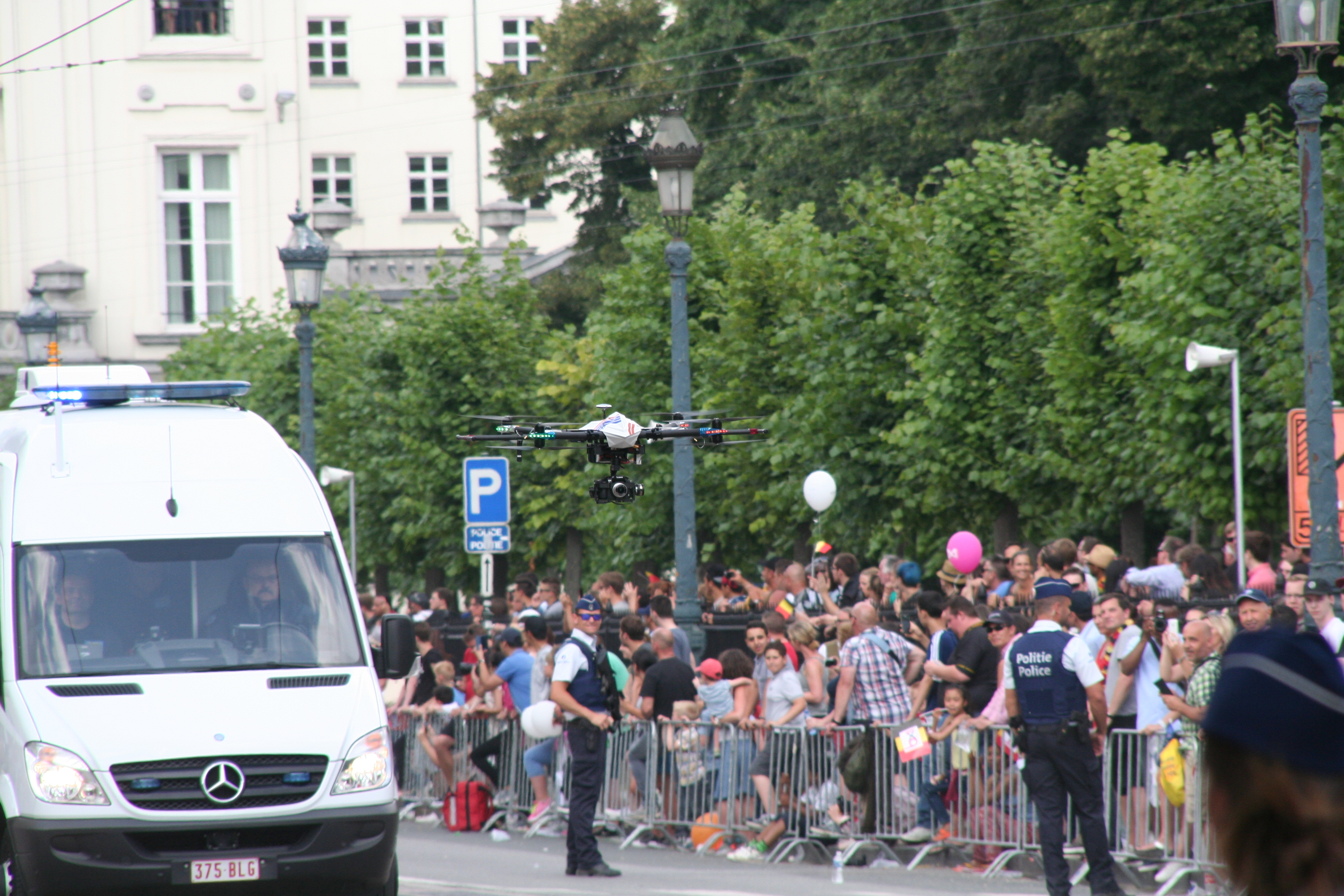 Fête nationale belge à Bruxelles le 21 juillet 2016 - Drone de la police belge - Drone of the belgian police